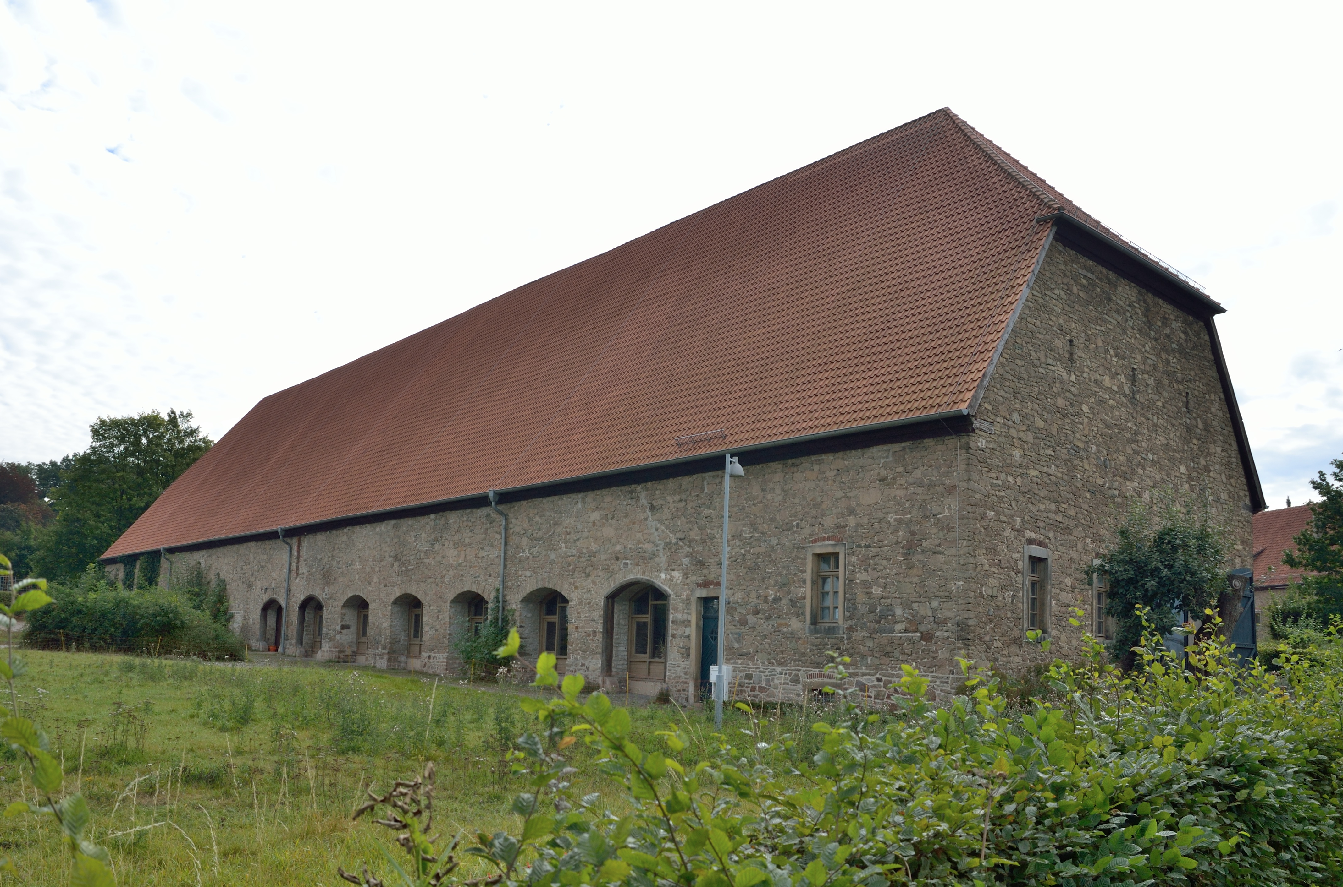 This is a photograph of an architectural monument. Biologische Station Lippe (Große Domänenscheune)